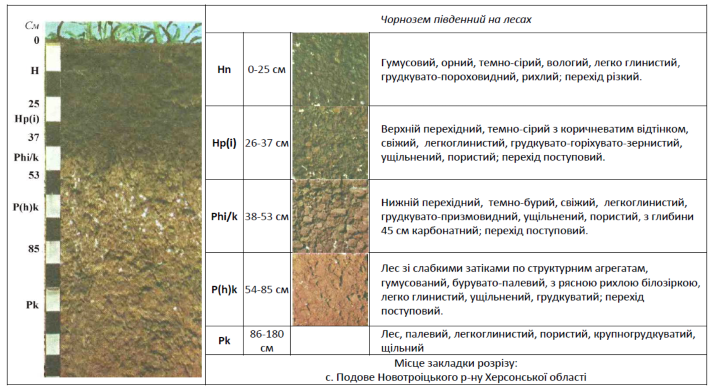 Чорнозем південний на лесах